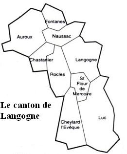 Le canton de Langogne Image personnelle